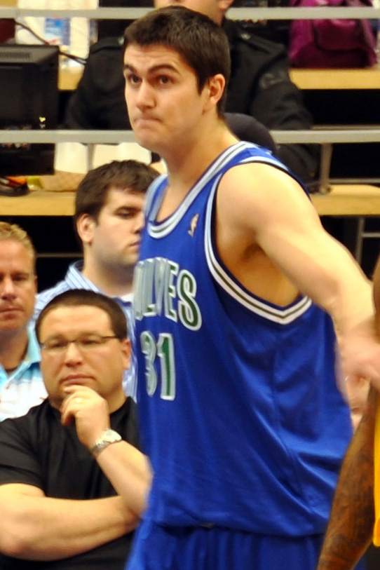 Darko Miličić, Lakers@Wolves_201004_0088